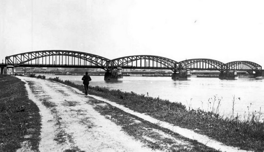 Budapest. A kétvágányú Összekötő vasúti híd második szerkezete Buda felől nézve